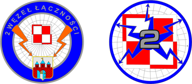 Odznaki 2 Rejonu Wsparcia Teleinformatycznego Sił Powietrznych